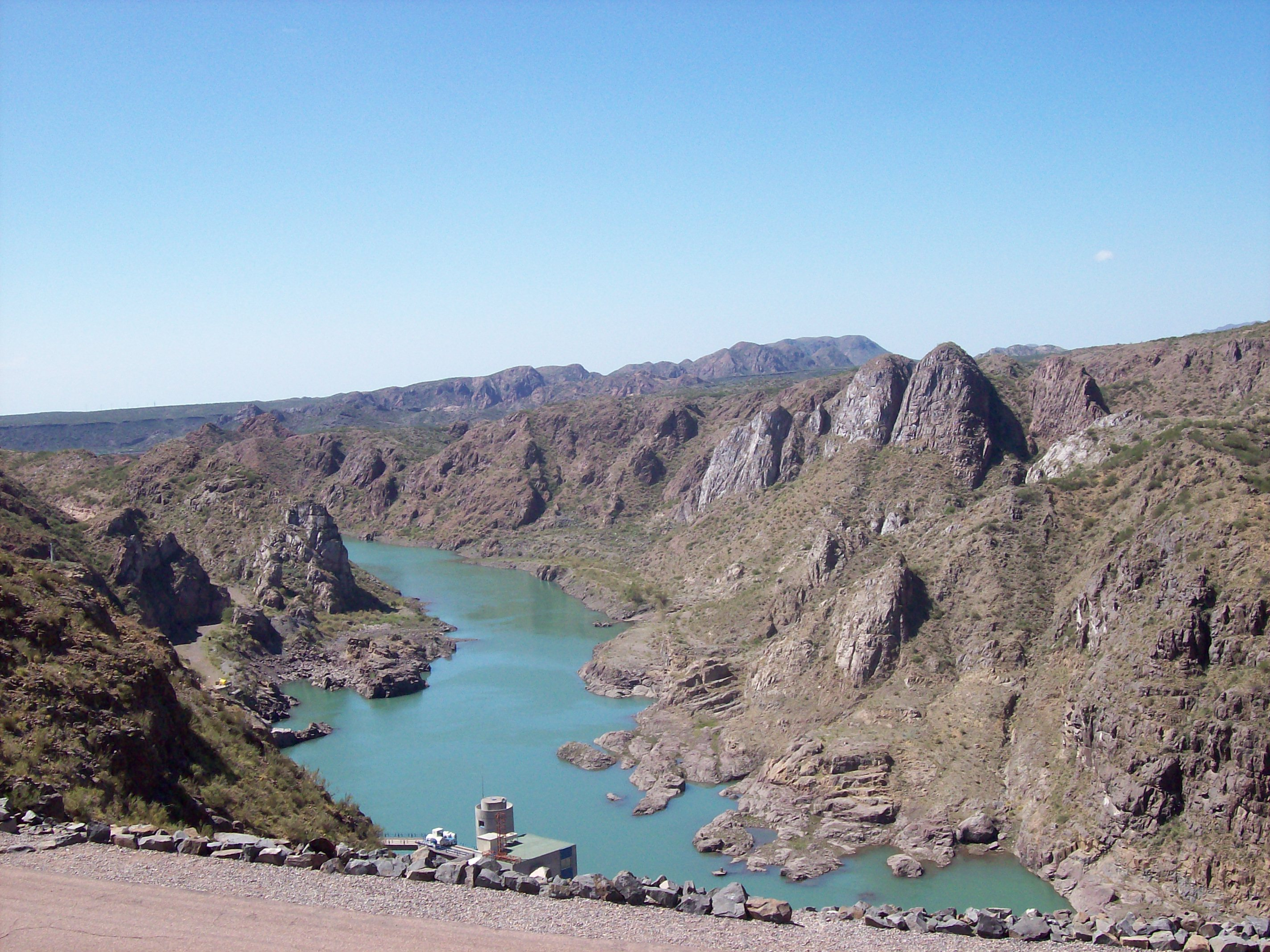 Río Diamante, en el depto de San Rafael en la provincia de Mendoza, Argentina. Foto tomada a pocos kms del Embalse Los Reyunos